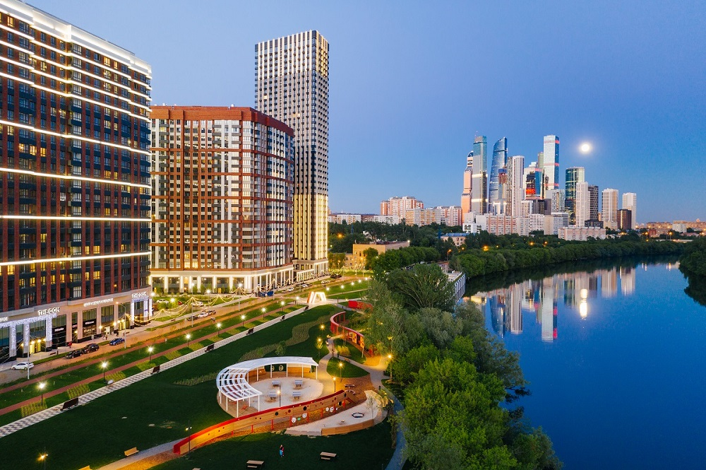 Шелепихинская набережная 34. Территория бывшего завода железобетонных конструкций № 355 и бывшего асфальтобетонного завода № 1. Первая очередь ЖК "Сердце Столицы"